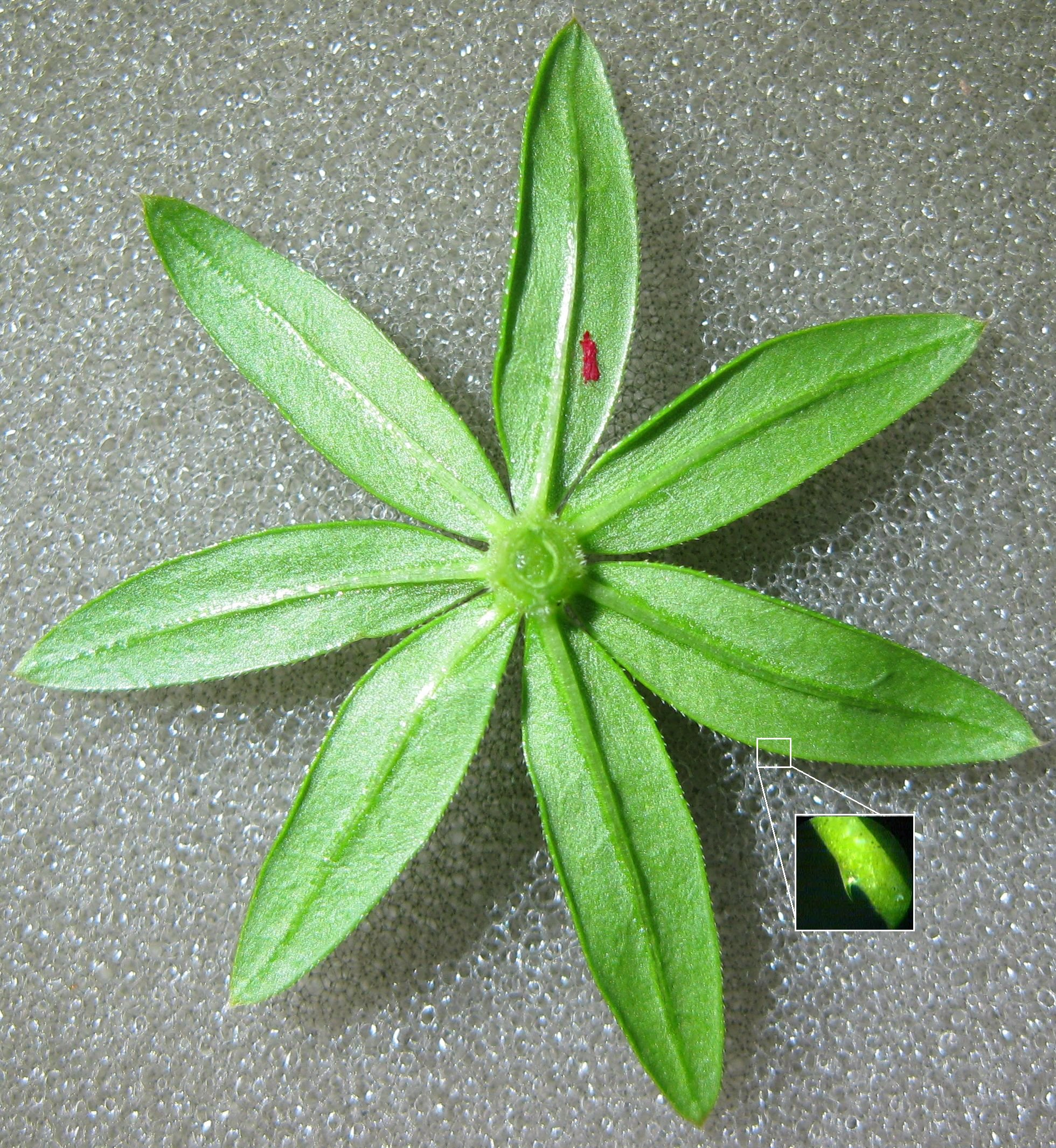 Wiesen-Labkraut (Galium mollugo), Quirl von unten